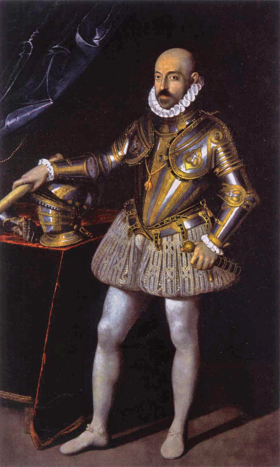 Ritratto in Armatura del Principe Marcantonio II Colonna